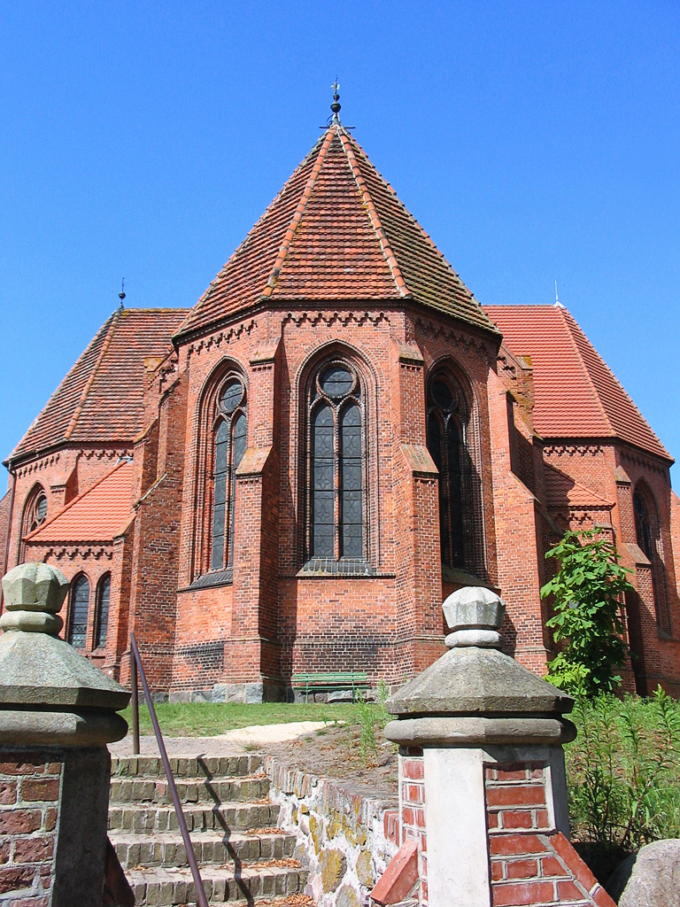 Beschreibung: Kirche in Wustrow Fotograf: Darkone, 4. August 2004